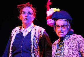 Lucienne des Vamps et Solange, nouveau duo dans LABEL VAMP